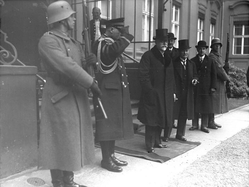 Der Oesterreichische Bundeskanzler a.D. Johannes Schober, ist im Alter von 57 Jahren gestorben ! Der letzte Besuch des österreichischen Bundeskanzlers Dr. Schober beim Reichspräsidenten in Berlin.